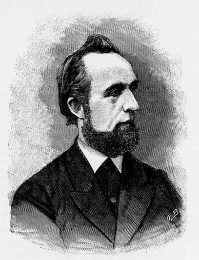 Tyske teologen och prästen Otto Funcke.